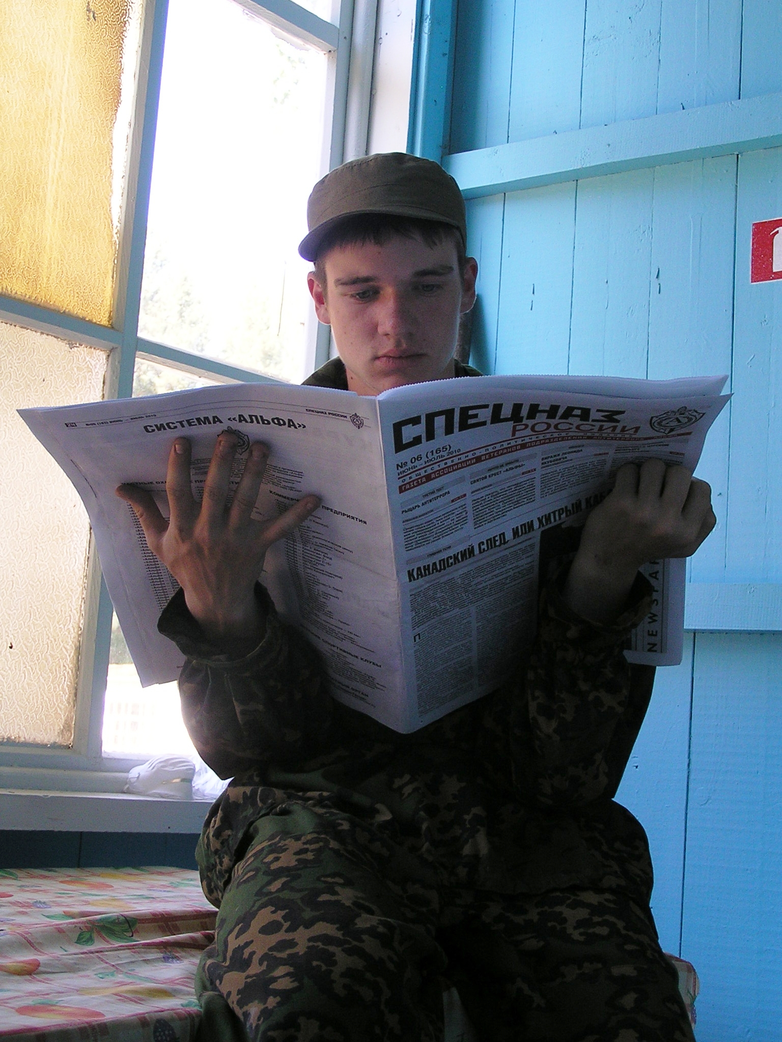 Златоуст газета спецназ